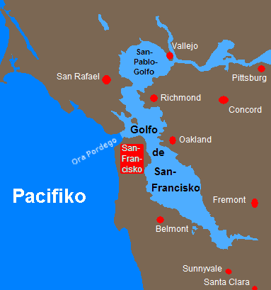 Golfo de San-Francisko